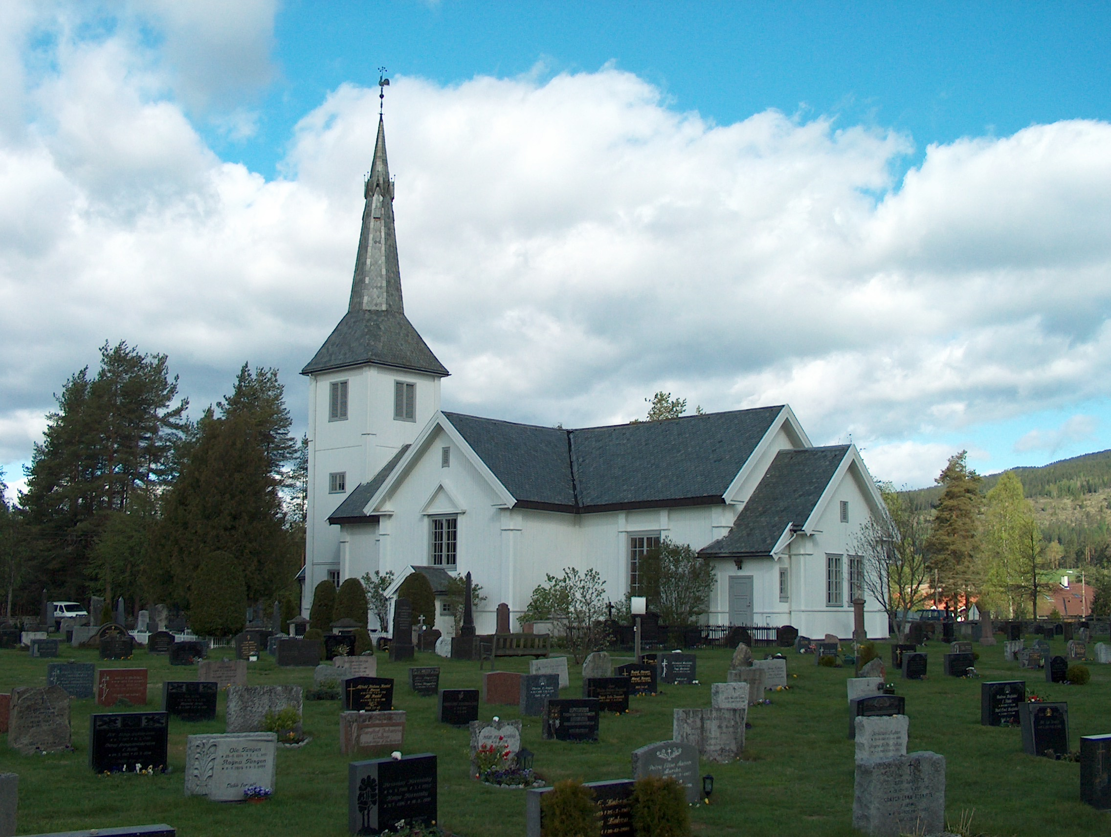 Lunder kirke, Sokna